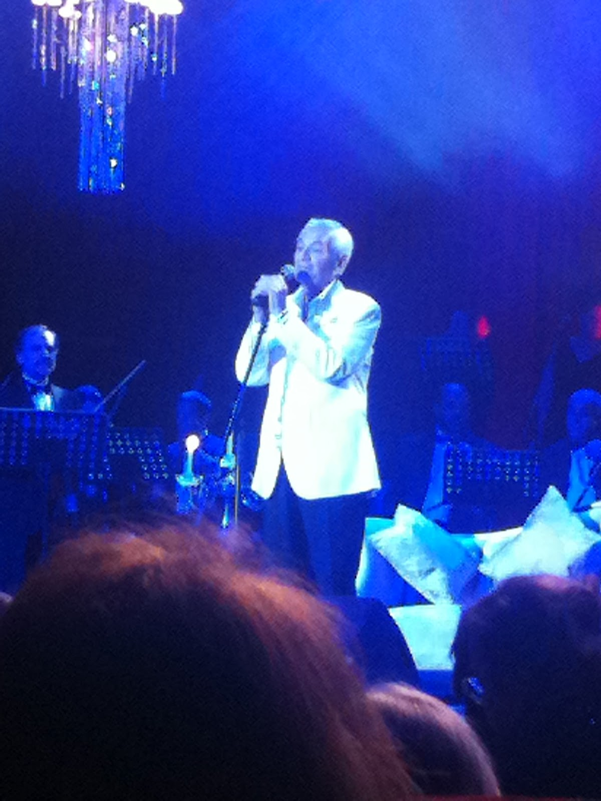 Adnan Şenses, Bülent Ersoy, Muazzez Abacı üçlüsü tarafından Bostancı Kültür Merkezi'nde düzenlenen Klasik Türk Müziği konserinde Bülent Ersoy sahne performansıyla, 9 Nisan 2012.